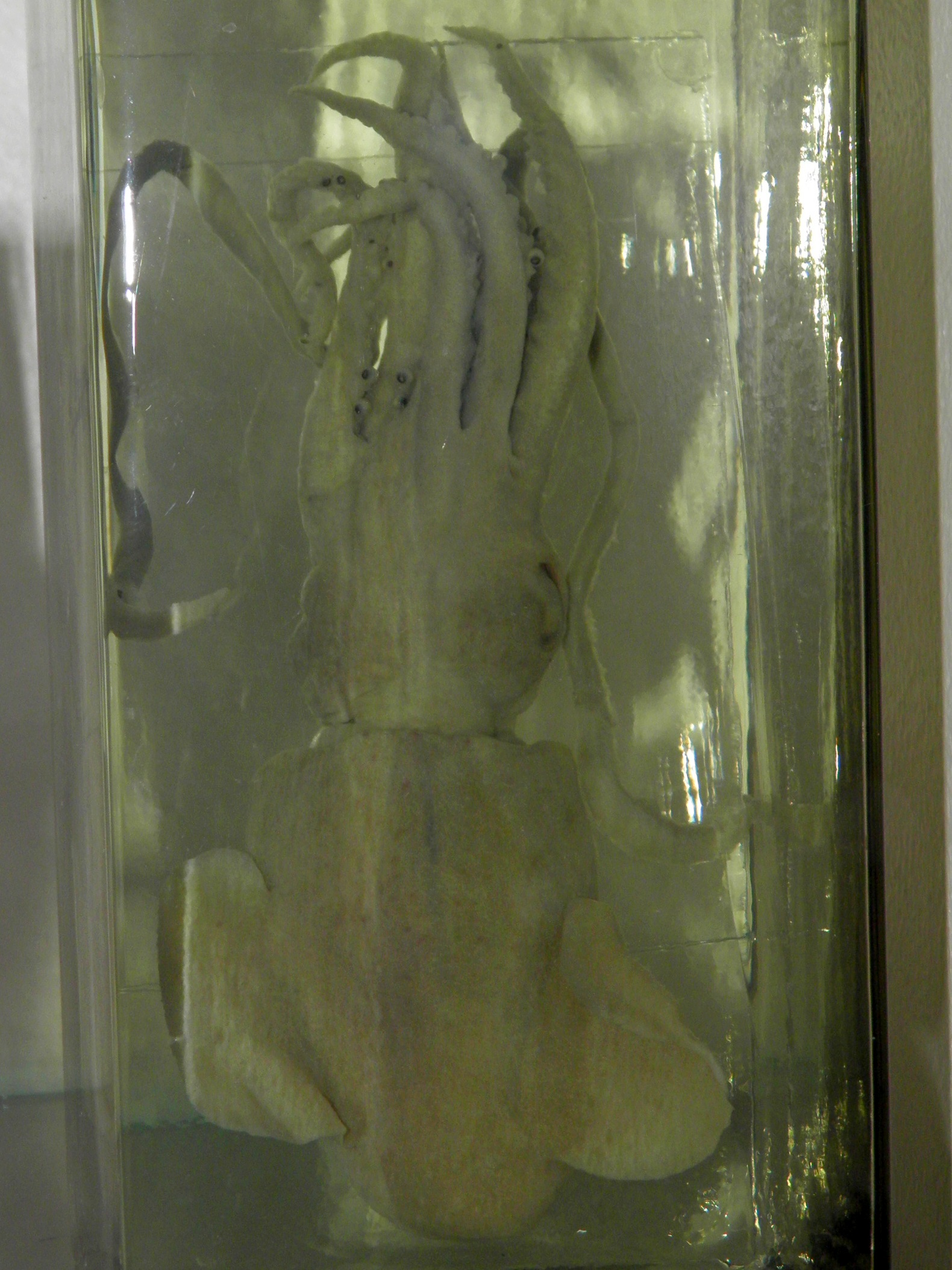 Rossia pacifica в Научном музее ДВФУ (г. Владивосток)